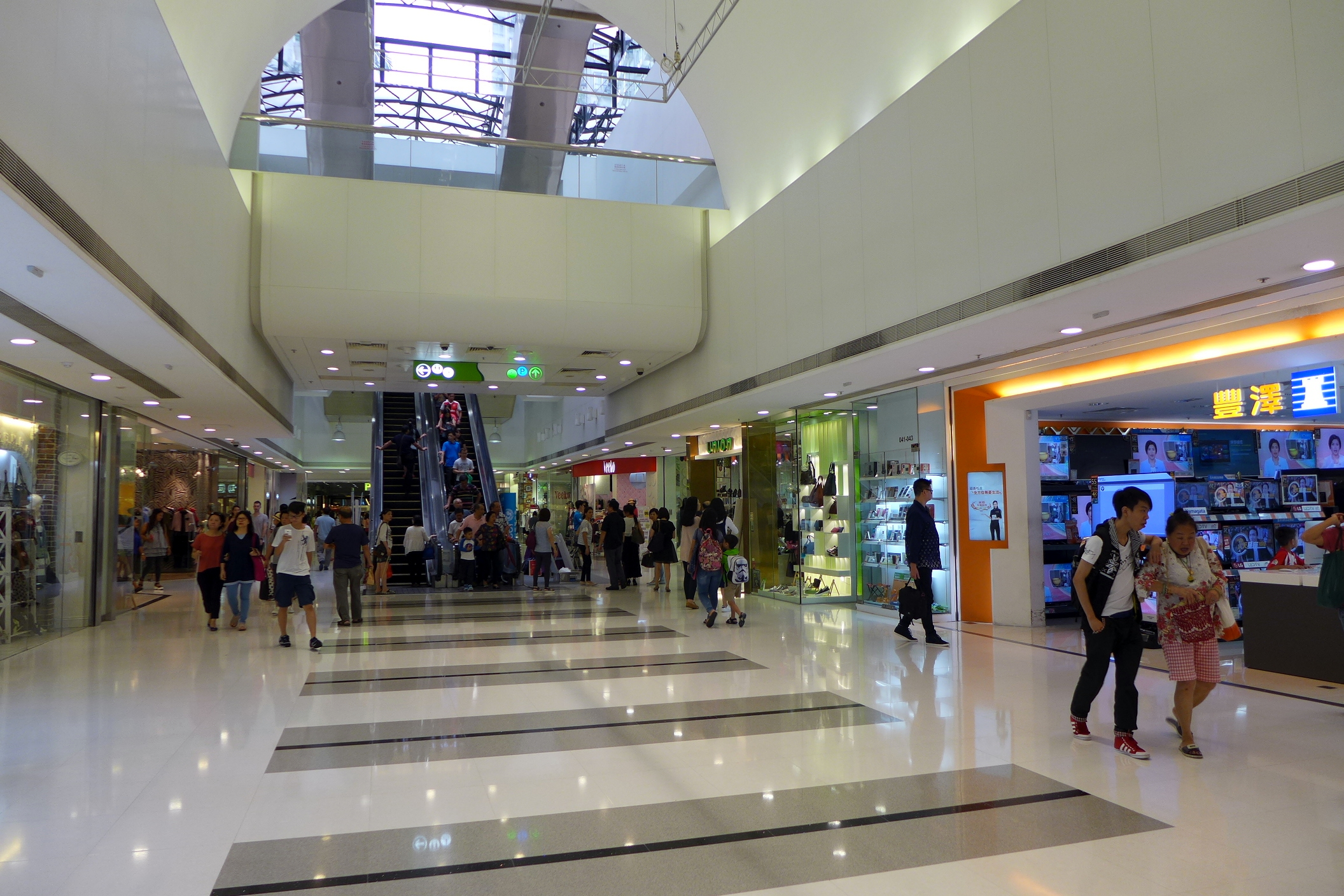 Uptown Plaza Void